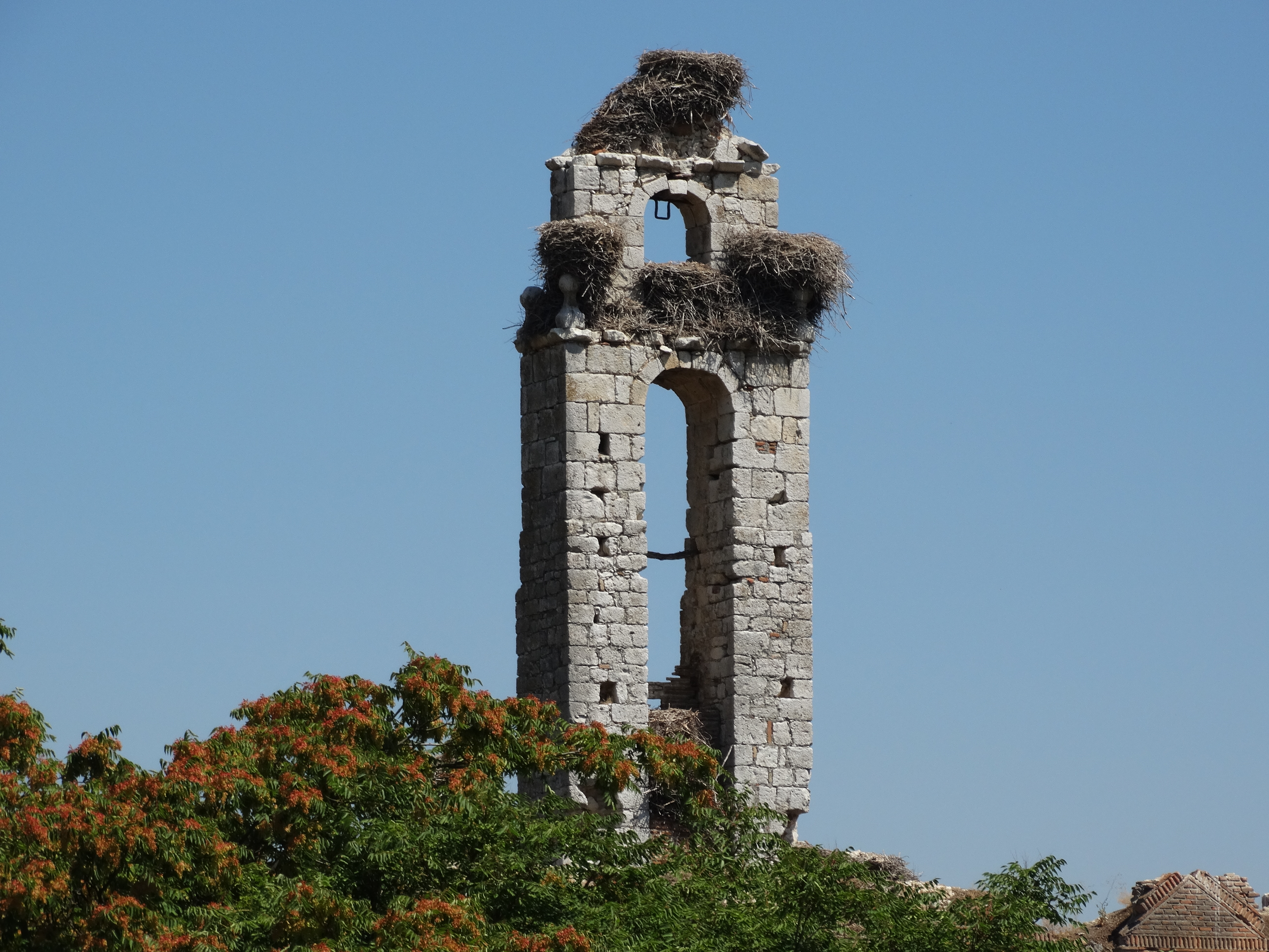 Ruinas del despoblado de Aniago en Valladolid, España. Espadaña del antiguo monasterio.